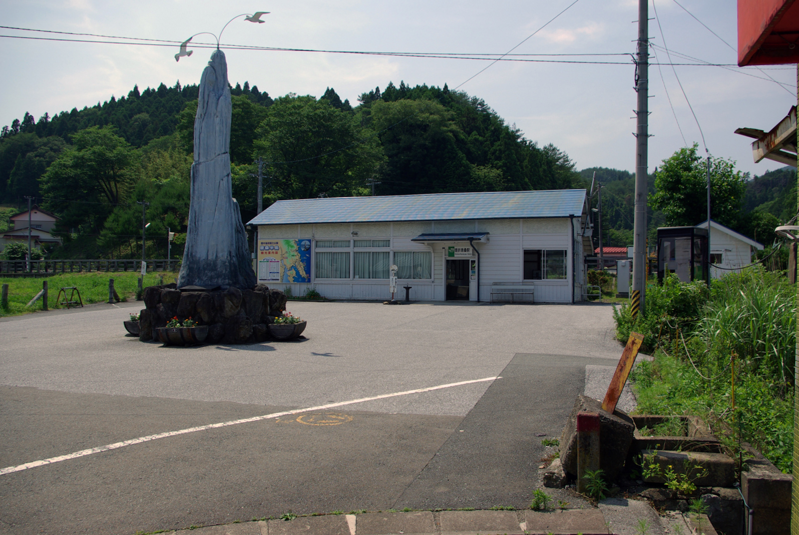 JR大船渡線鹿折唐桑駅